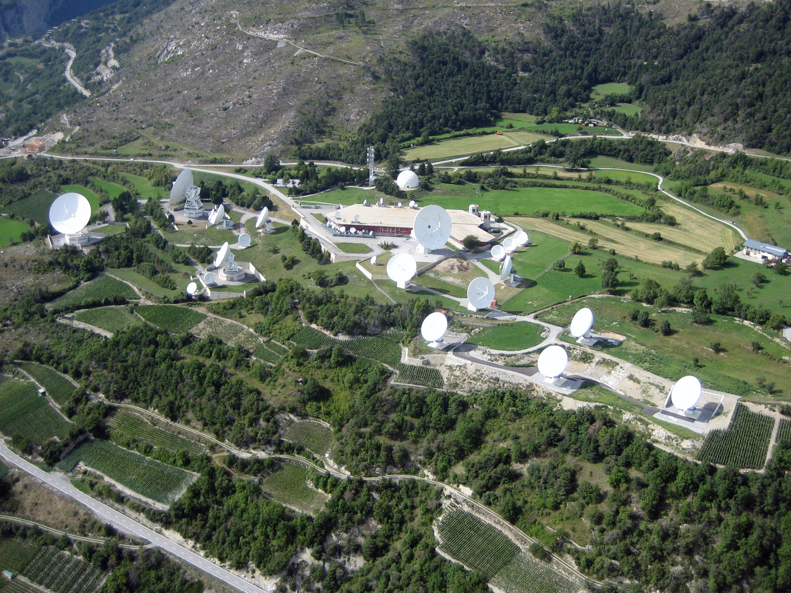 Luftbild der Onyx-Abhörinfrastruktur in Leuk, Schweiz